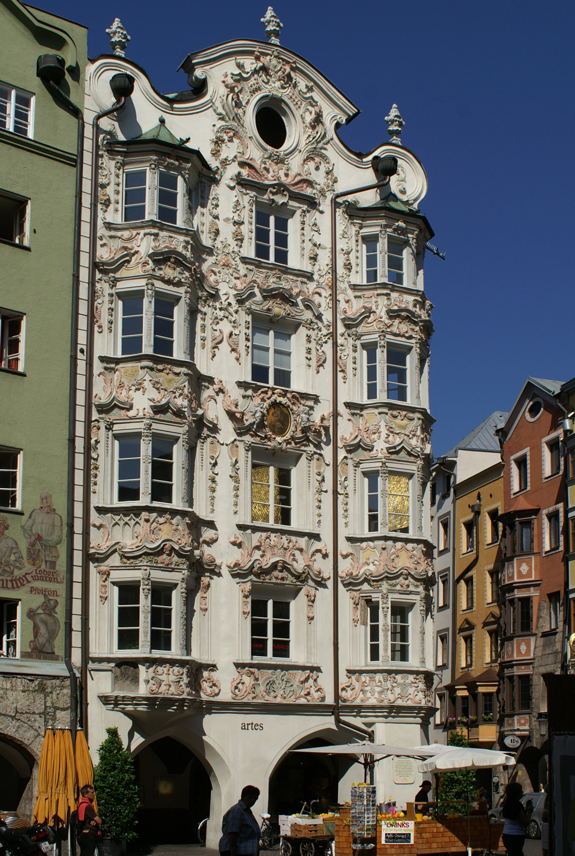 Helblinghaus, Innsbruck, mit berühmter barocker Stuckfassade.